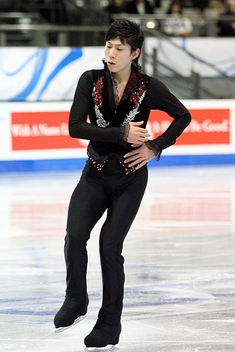 Кэйдзи Танака на финале Гран-при среди юниоров сеона 2011-2012